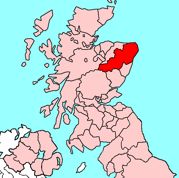 Aberdeenshire